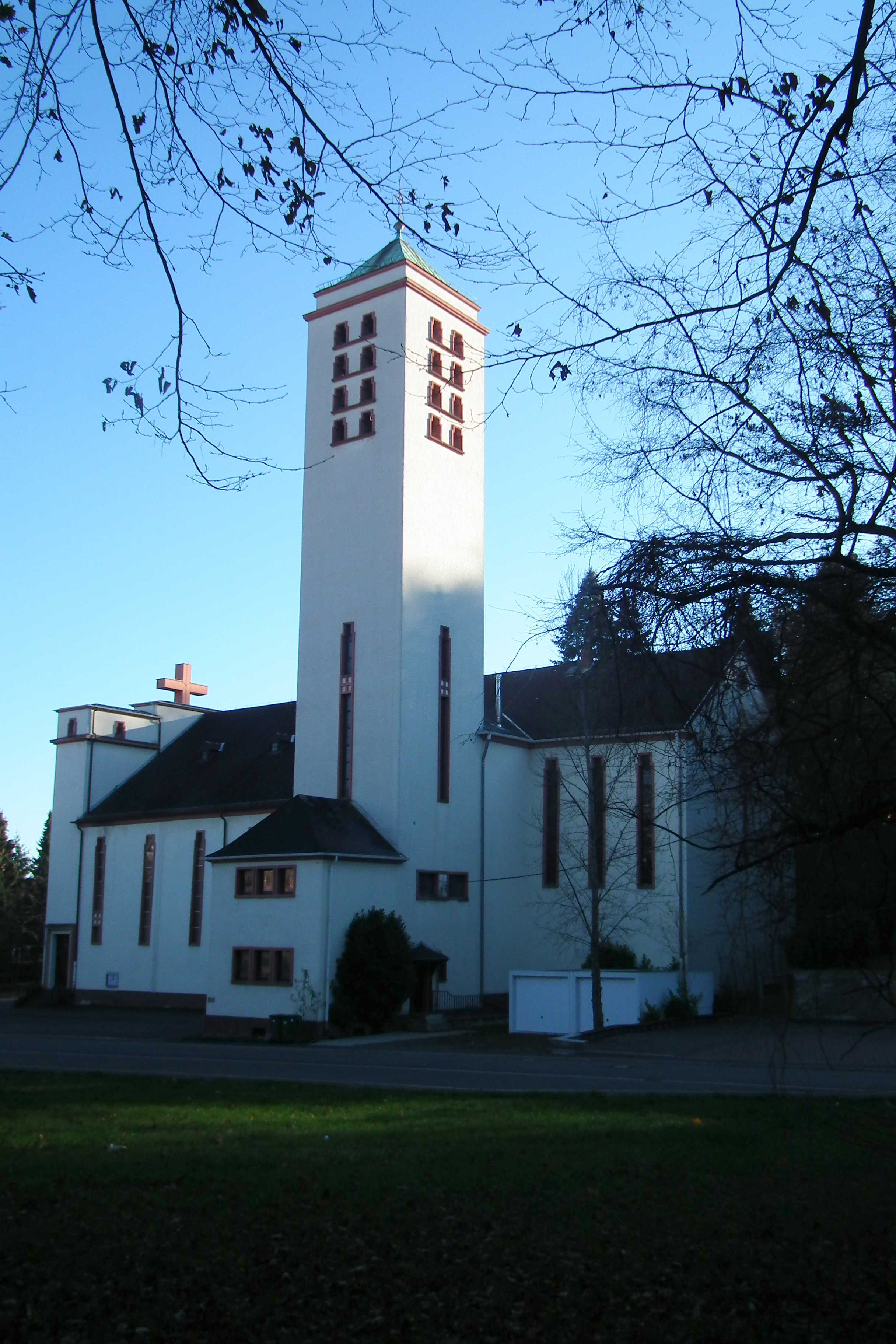 66125 Saarbrücken Dudweiler, Karlstraße